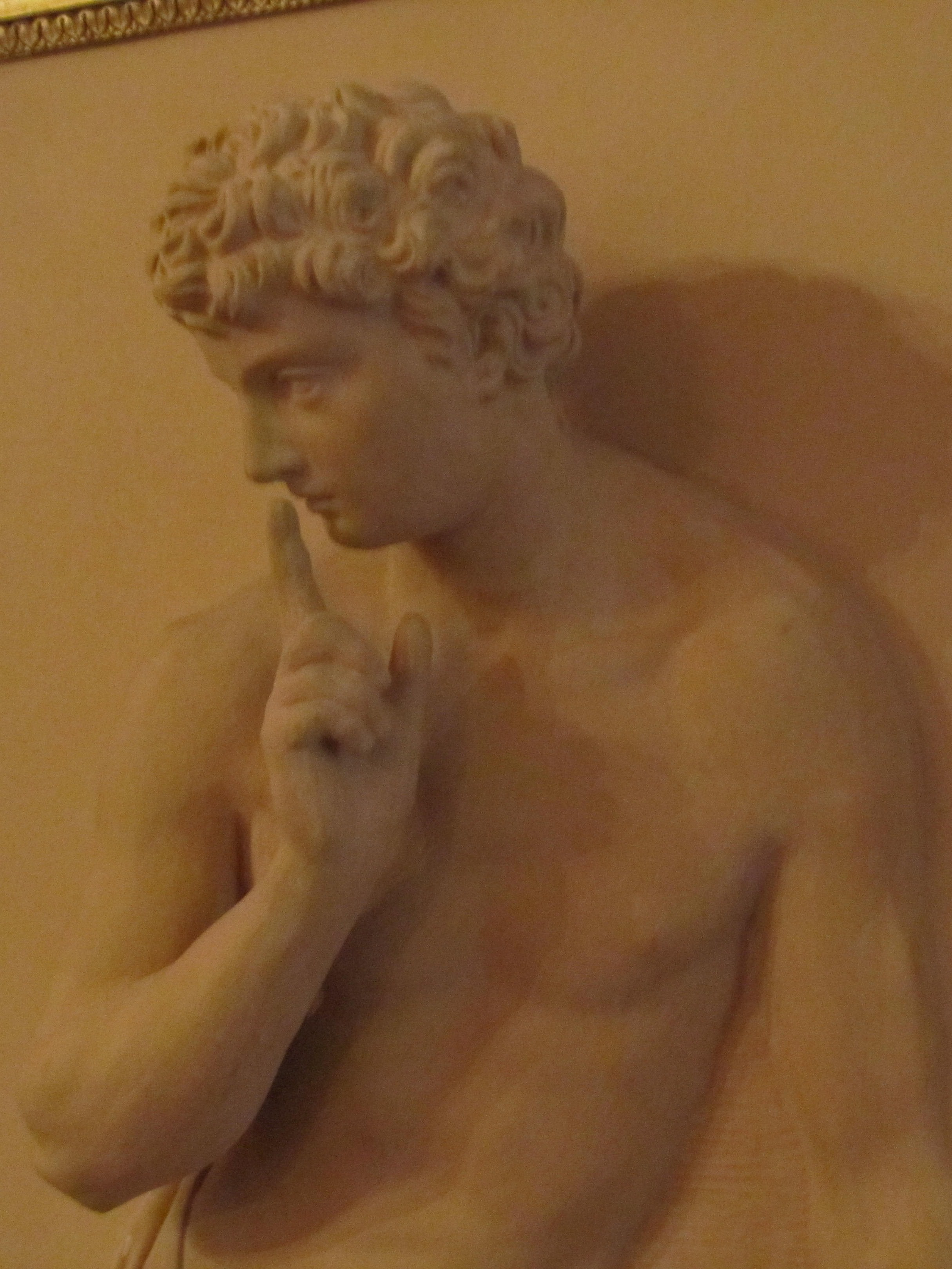 Allegorie des Schweigens (Detail), Martin Gottlieb Klauer, um 1800, ausgestellt im Schlossmuseum in Weimar.